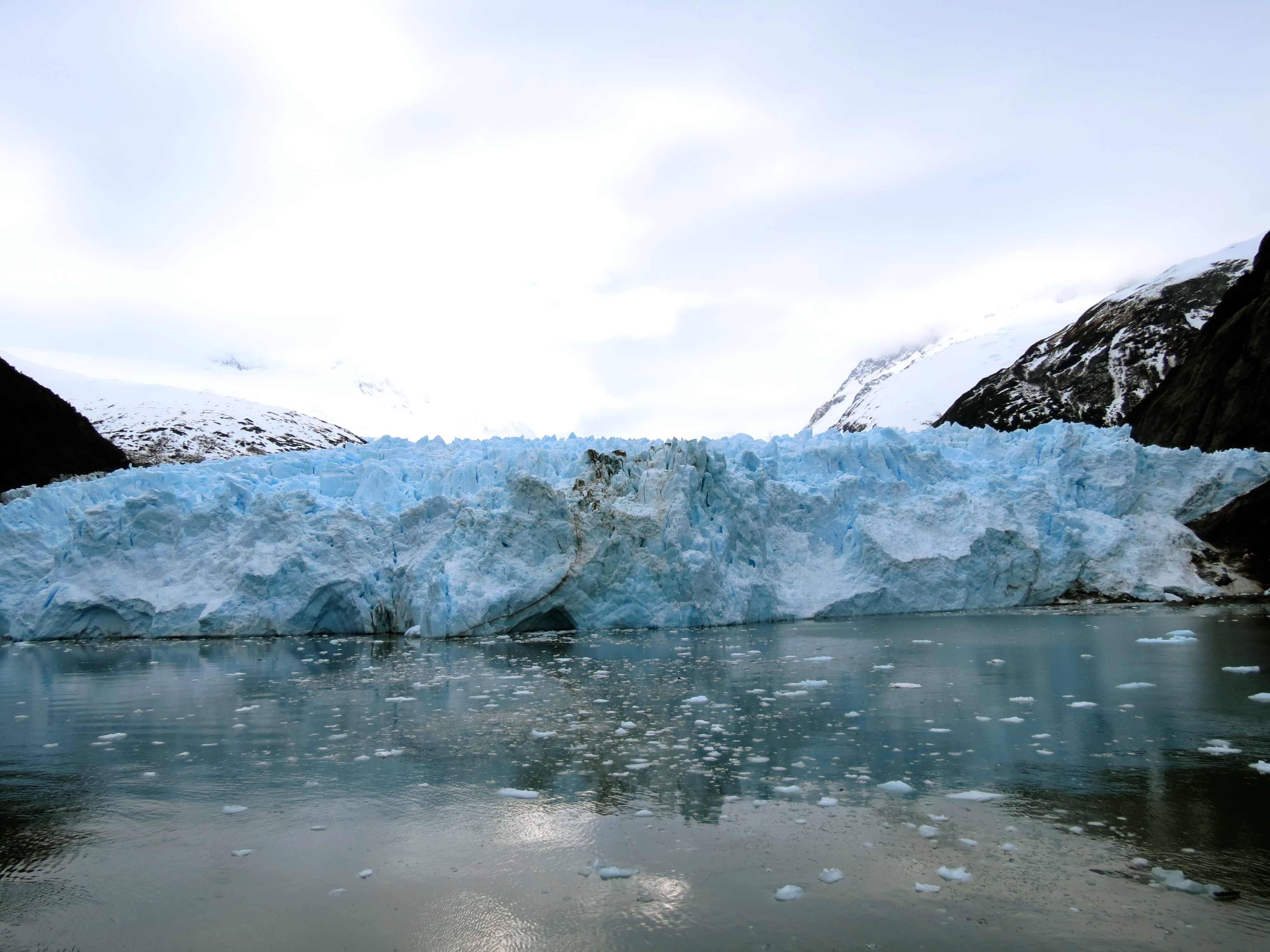 Fiordo Garibaldi en Canal Ballenero Magallanes